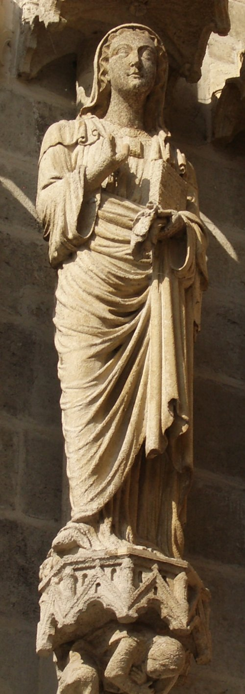 Statue de Sainte Ulphe (Ulphia) au portail occidental de la cathédrale d'Amiens